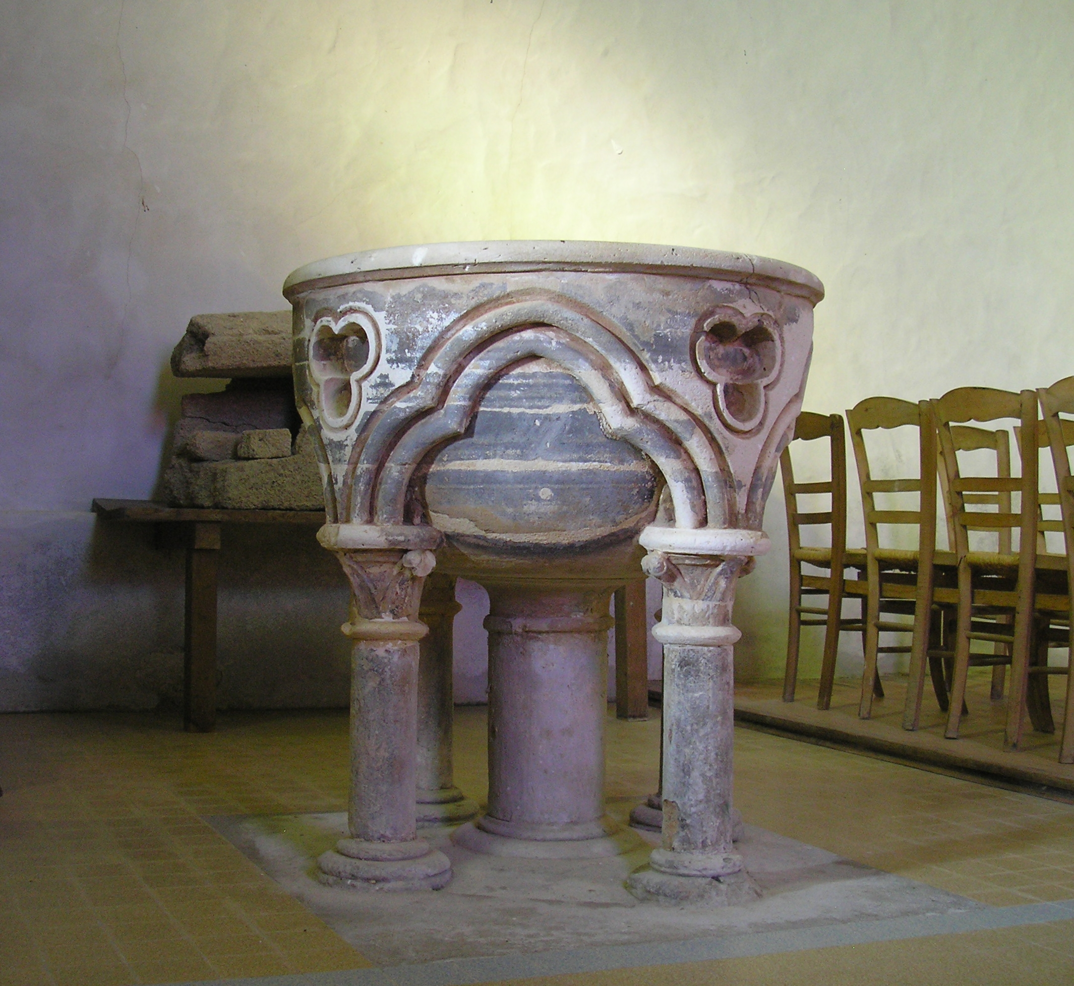 Montchaton (Normandie, France). Fonts baptismaux de l'église Saint-Georges.